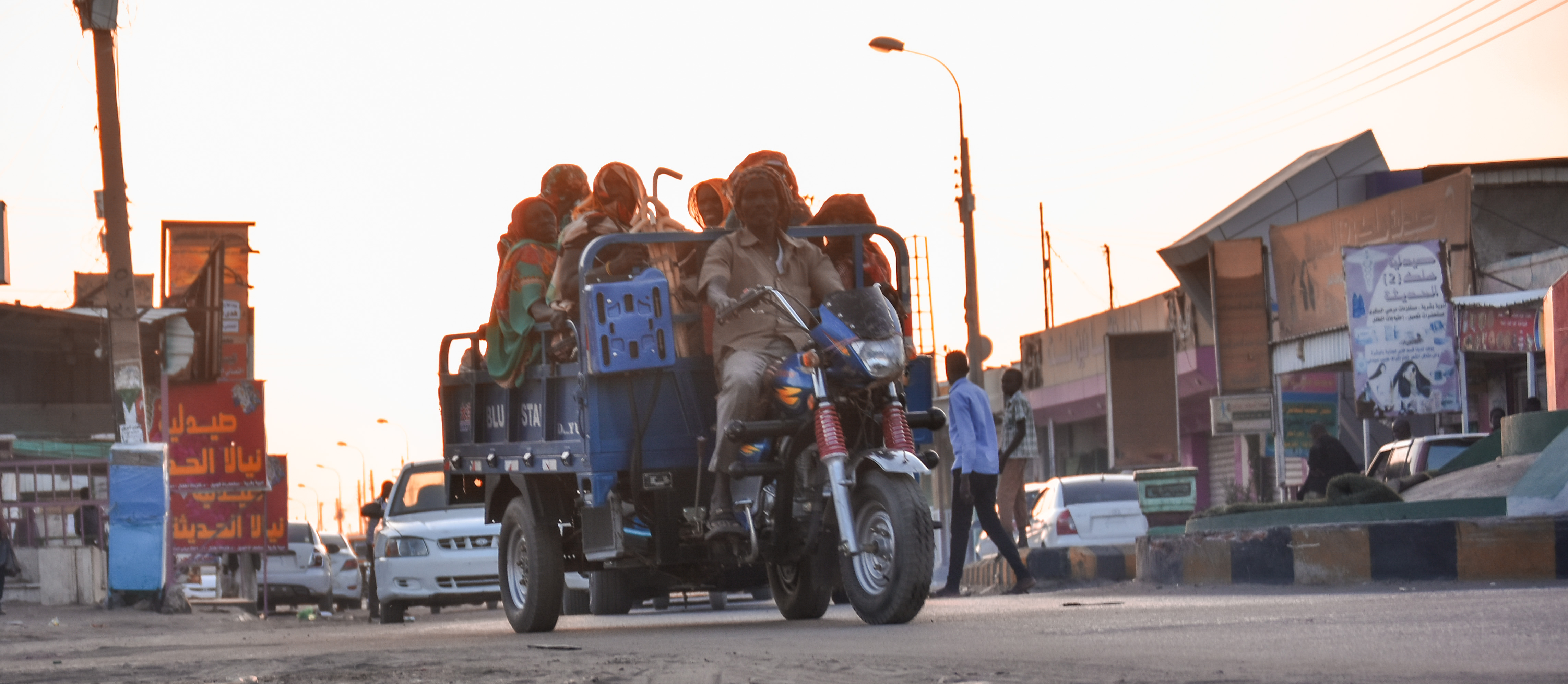 تكتك يحمل ركاب بشارع السينما This is an image with the theme "Africa on the Move or Transport" from: Sudan